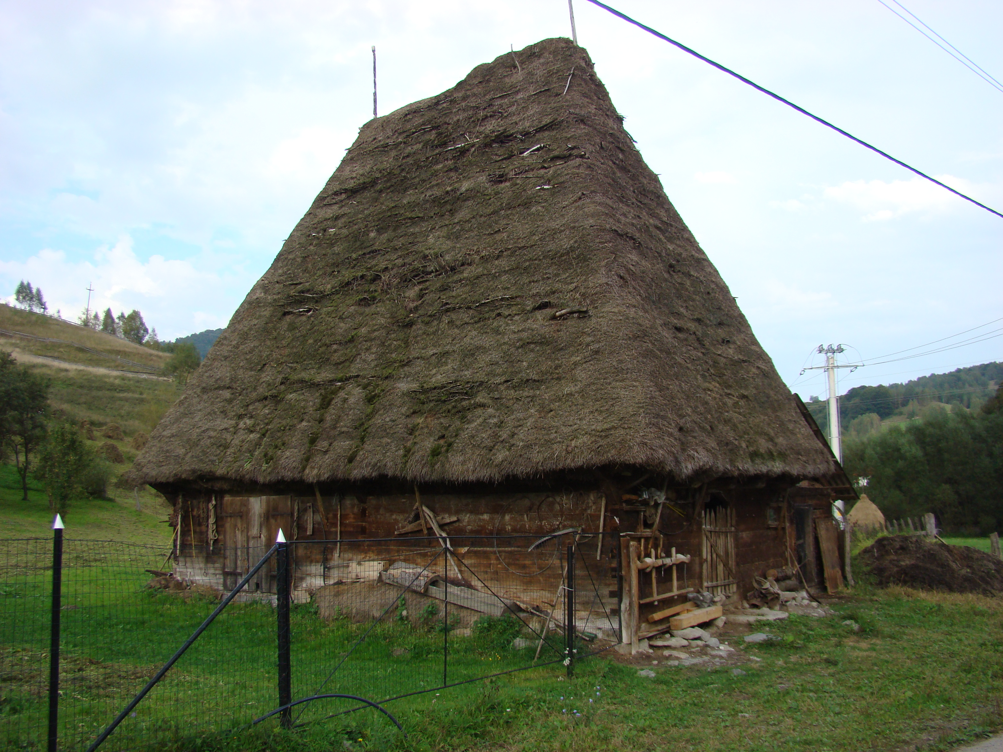 Șură moțească, Mogoș, județul Alba